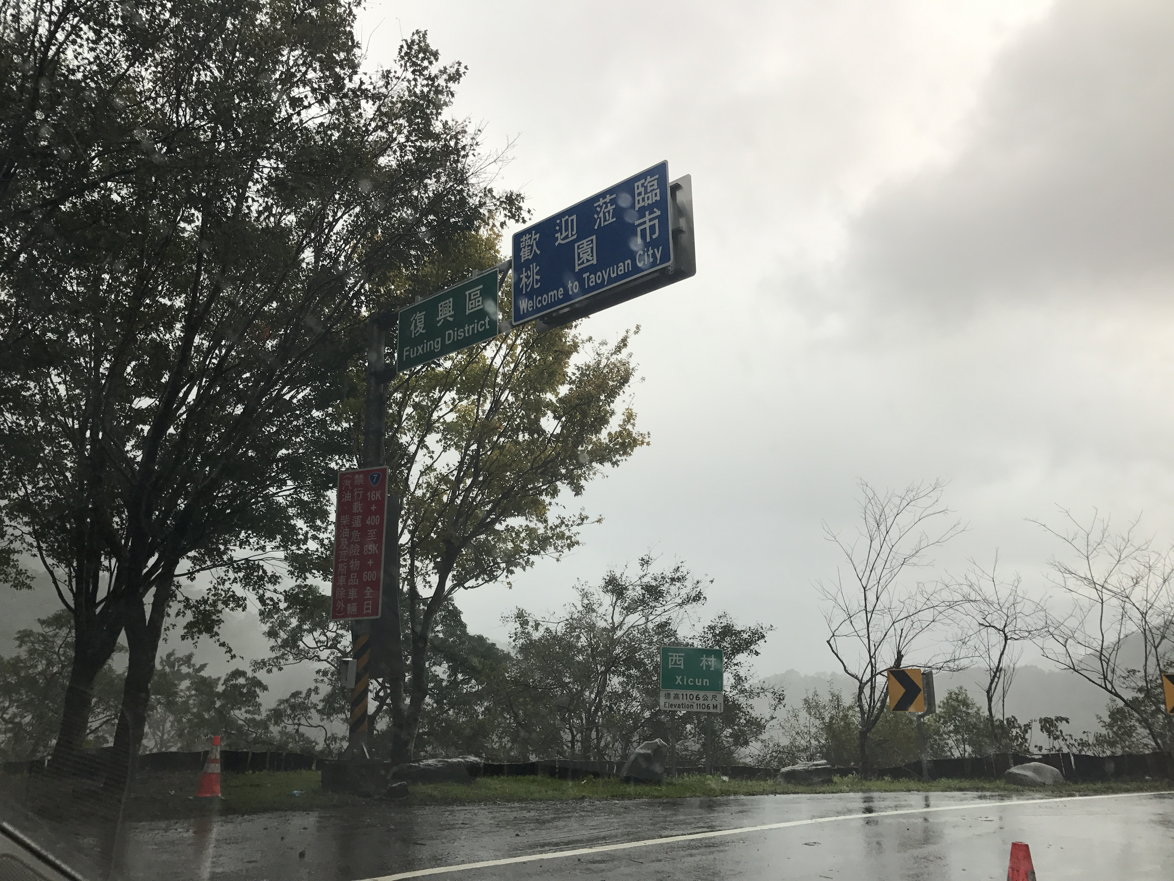 中文（台灣）: 台7線 北橫公路西村路段